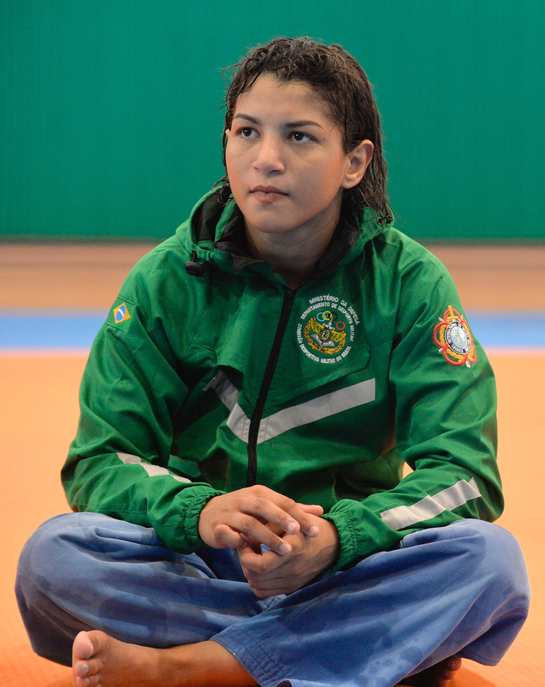 Treinamento da Equipe Brasileira de Judô em Mungyeong. Foto: Felipe Barra